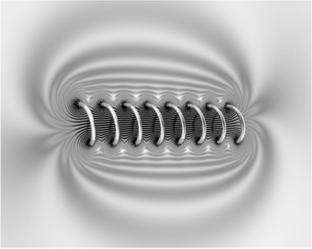 En solenoids magnetfält. En approximativ tillämpning av Biot-Savarts lag